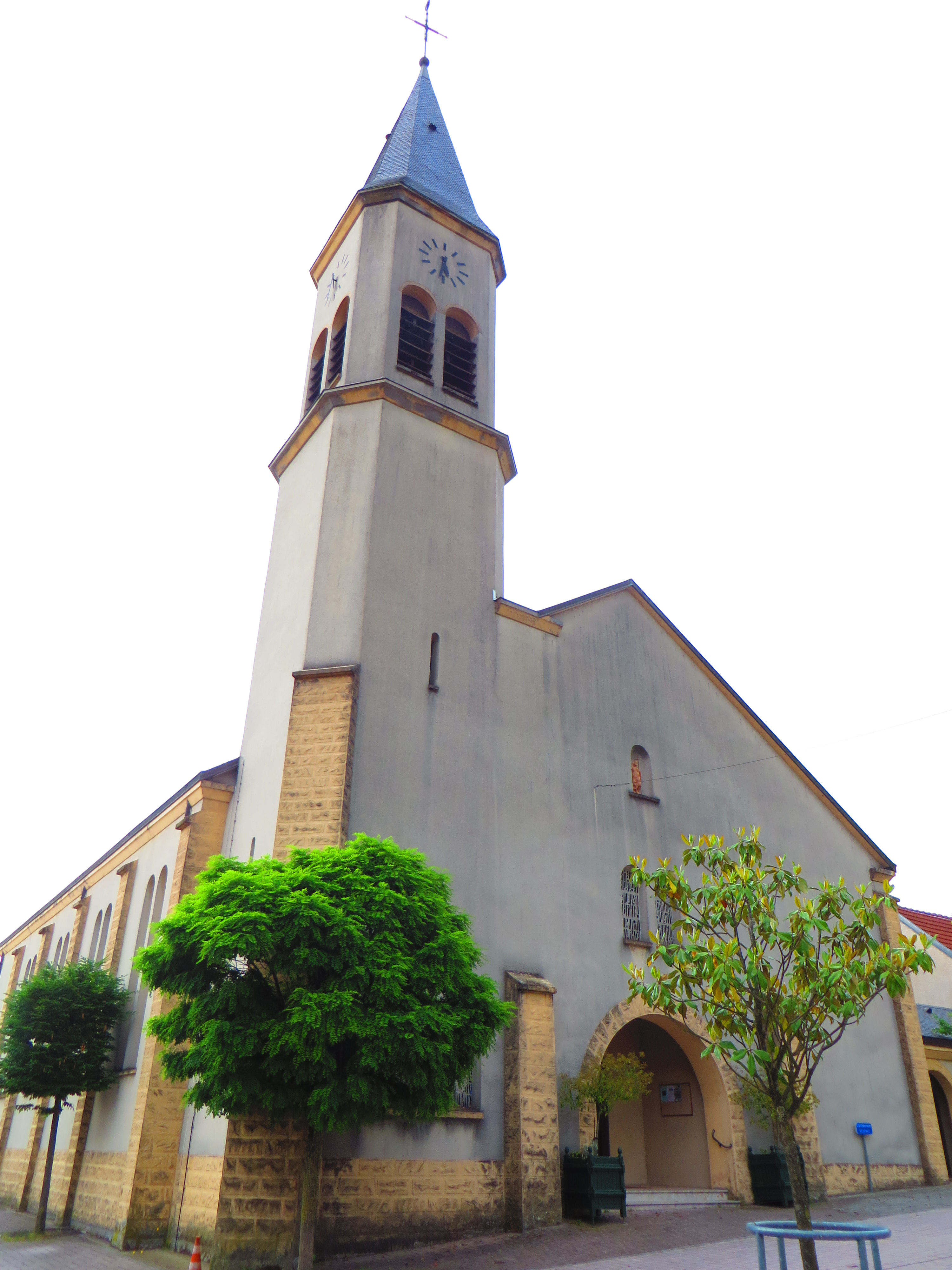 Woustviller Église Saint-Jean-Baptiste